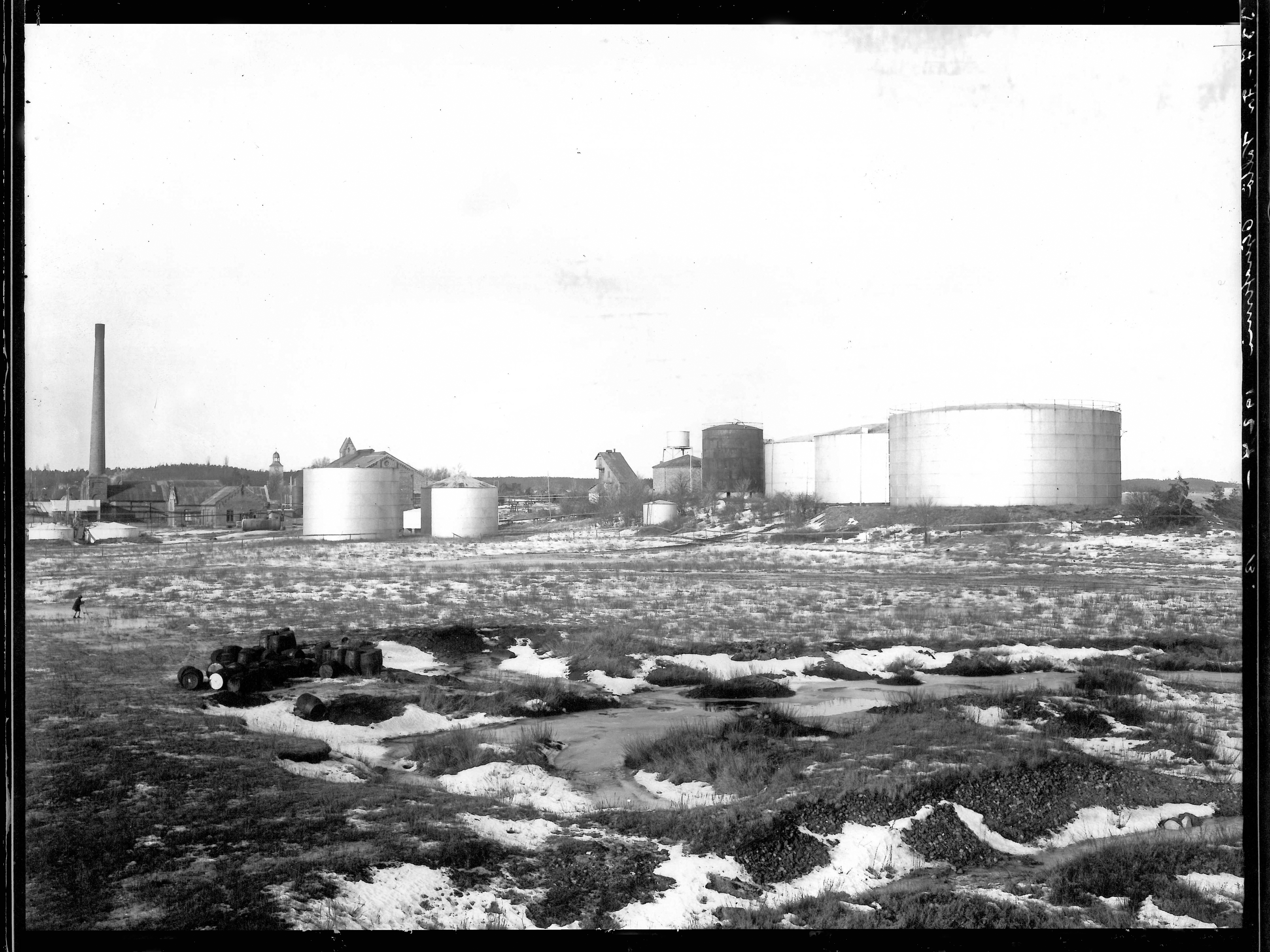 Bildet er hentet fra Arkivverket. Bilde er med snø fra sør med tanker og bygg Arkivinstitusjon : Statsarkivet i Stavanger Arkivnavn : Pa 1536 - Esso Norge as, Vallø Oljeraffineri og lager Sted : Norge, Vestfold, Tønsberg, Valløy Emneord: Olje, Oljeraffineri, Petroleum Avbildet